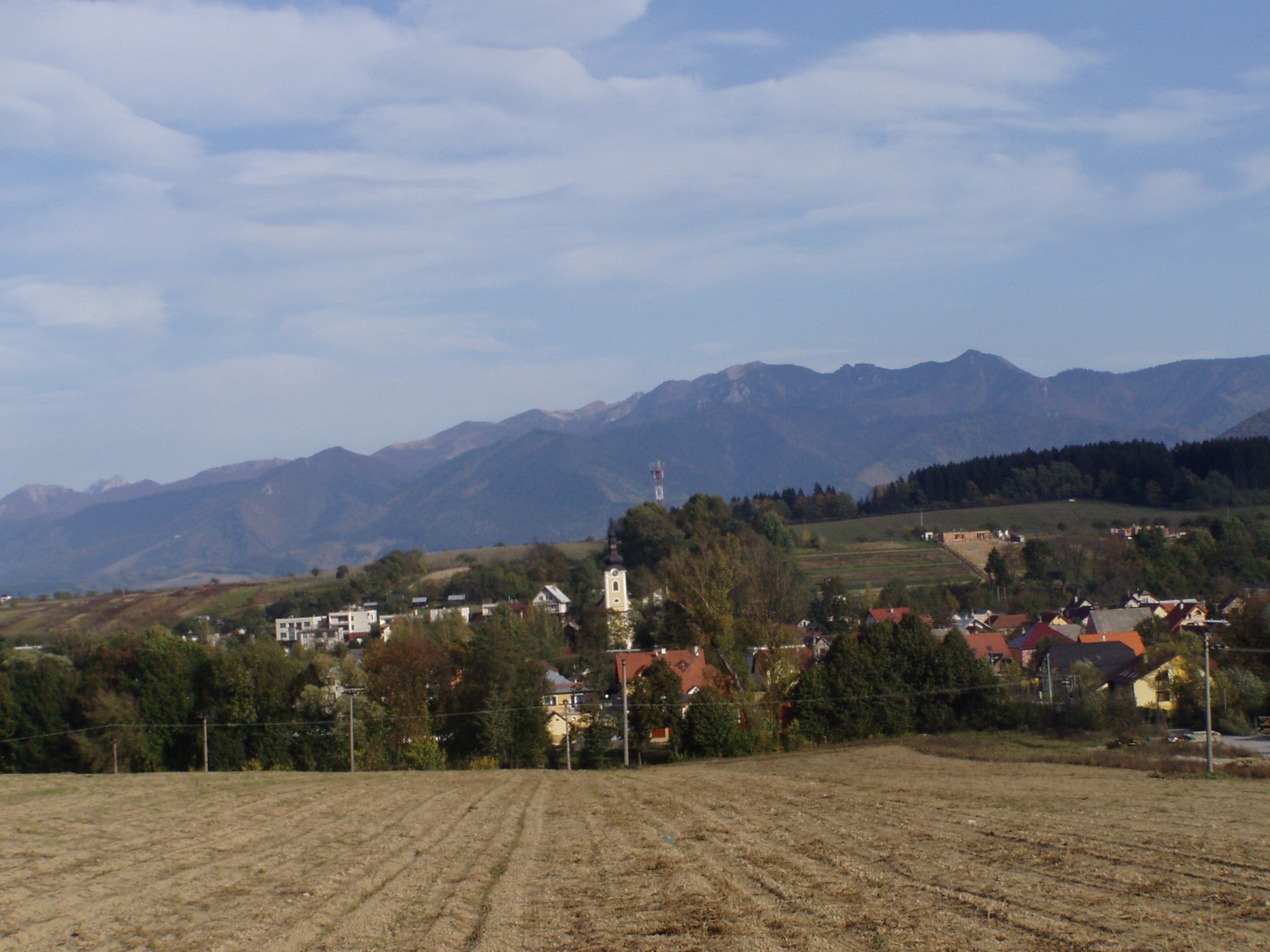 Centrum obce